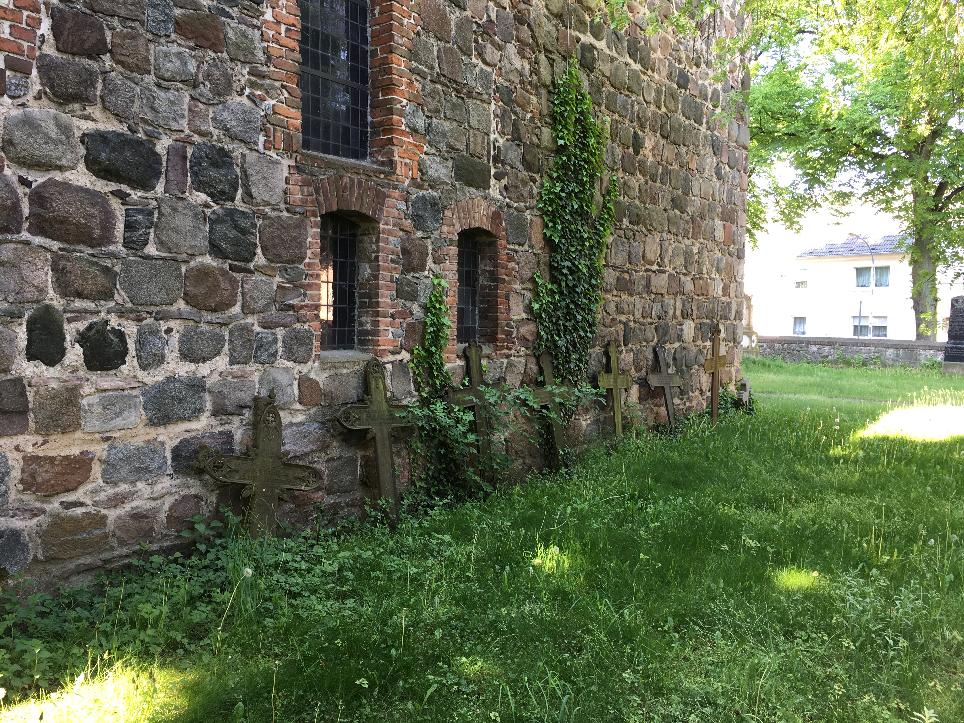 Die Dorfkirche in Selchow ist eine romanische Feldsteinkirche aus der ersten Hälfte des 13. Jahrhunderts. Die Fenster wurden um 1700 zum Teil vergrößert; das Bauwerk in den Jahren 1972 und 1973 restauriert. Im Innern befinden sich unter anderem ein zweigeschossiger Kanzelaltar und eine Fünte aus dem Jahr 1710 sowie ein Kruzifix, dass Ende des 15. Jahrhunderts geschaffen wurde.